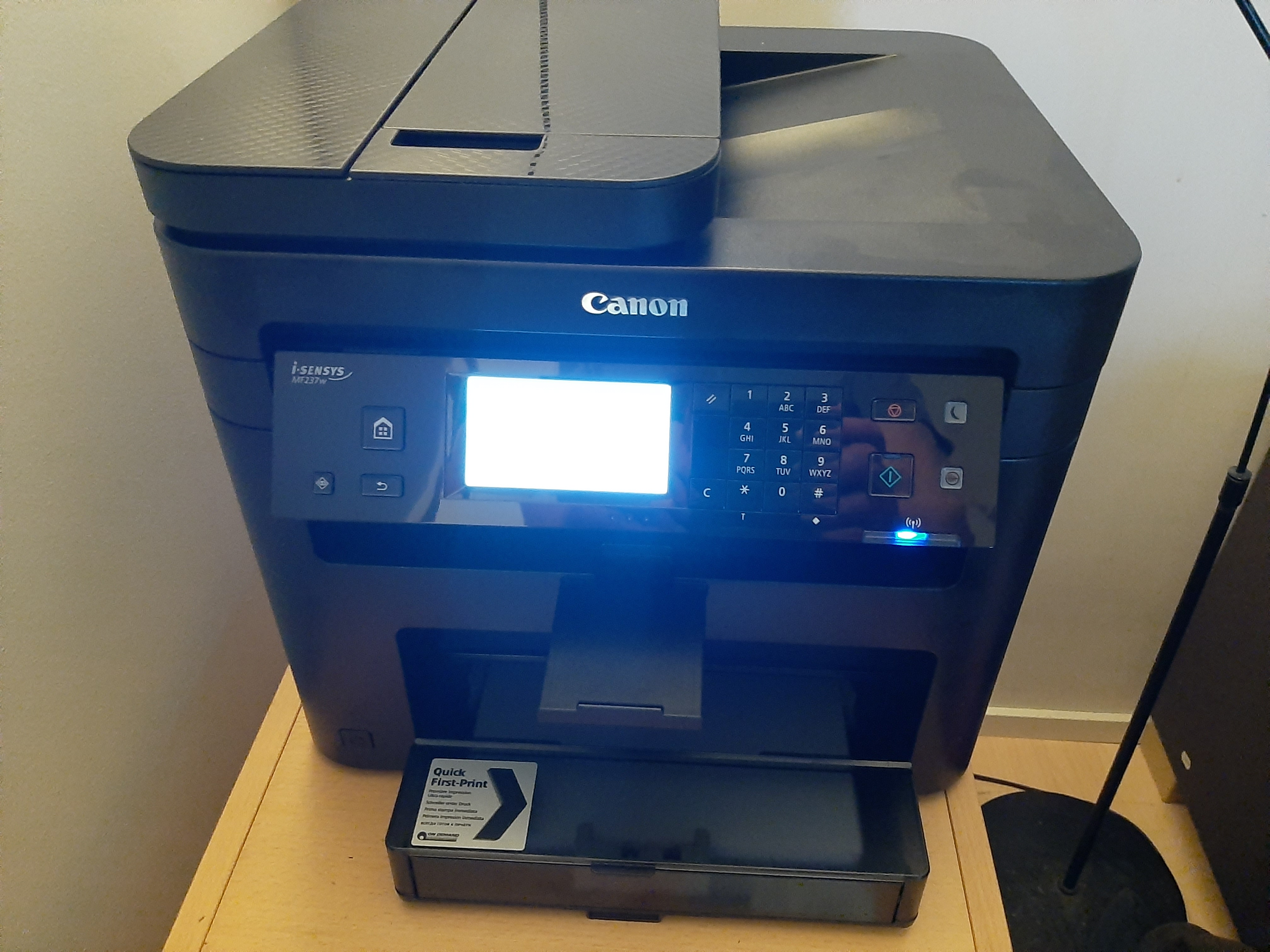 Canon i-Sensys MF237w monitoimitulostin